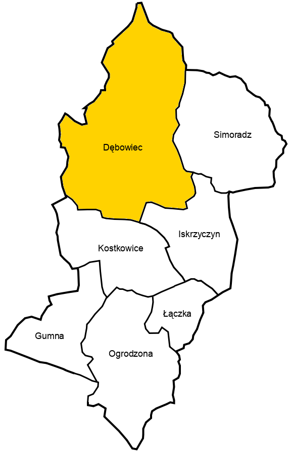 Sołectwo Dębowiec na mapie gminy